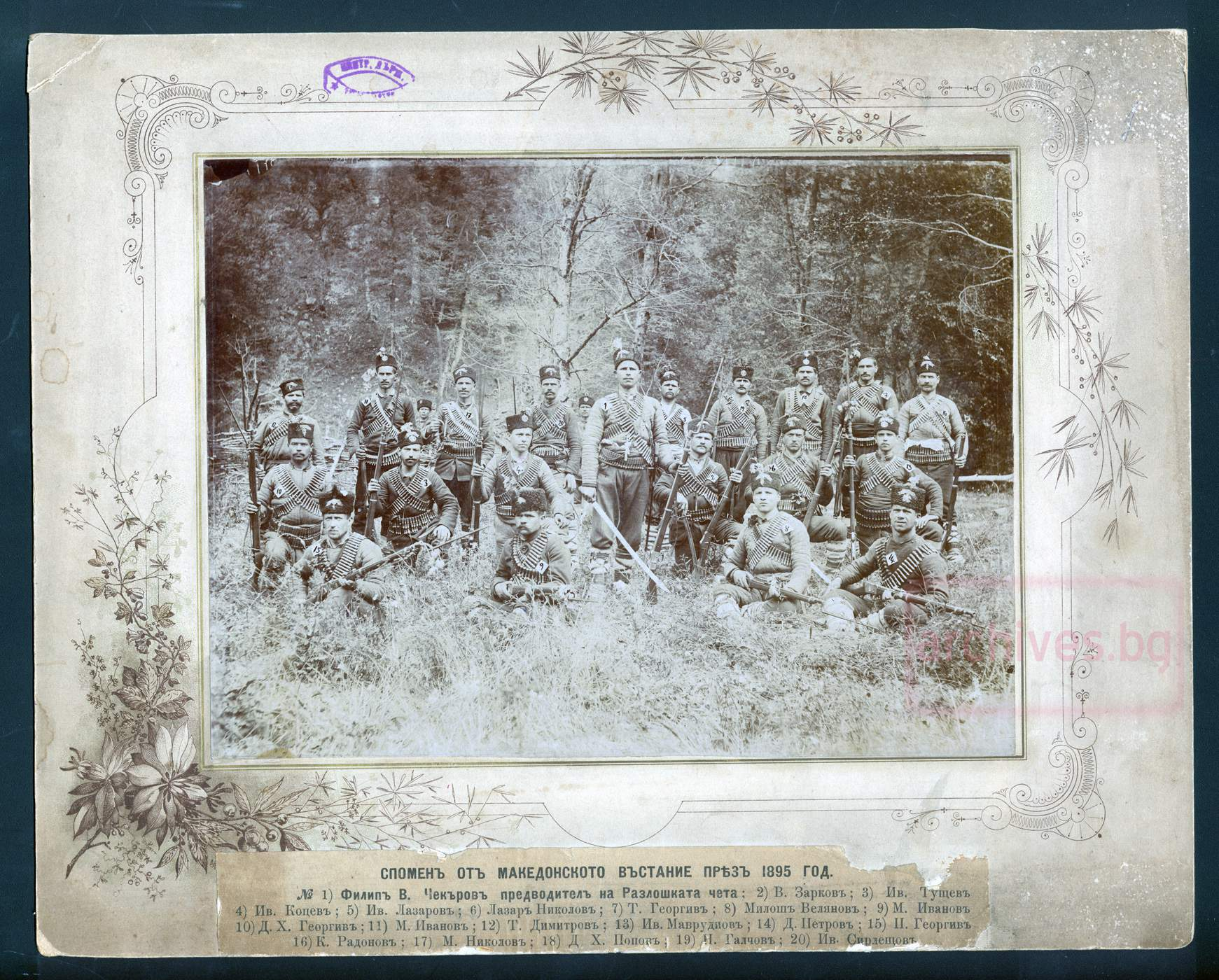 Четата на Филип Чакъров.